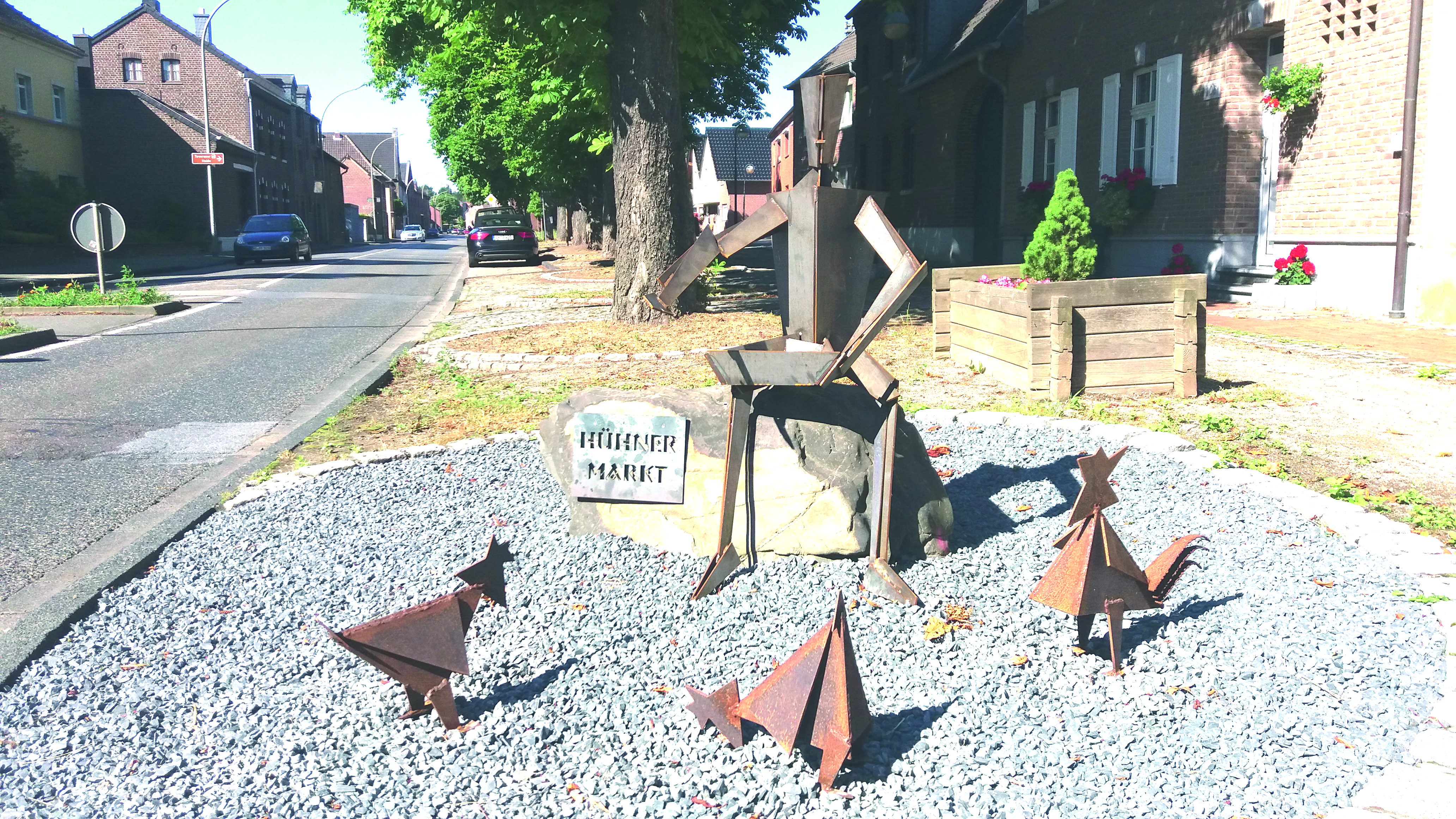 Wilii Arlt, Skulptur Hühnermarkt, 2011, Scherpenseel, Heerlener Stzraße